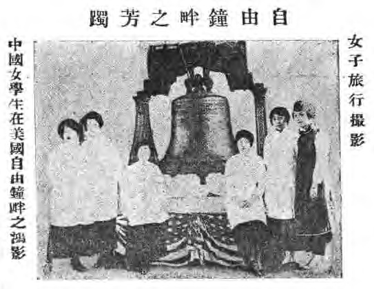 治家全書圖像